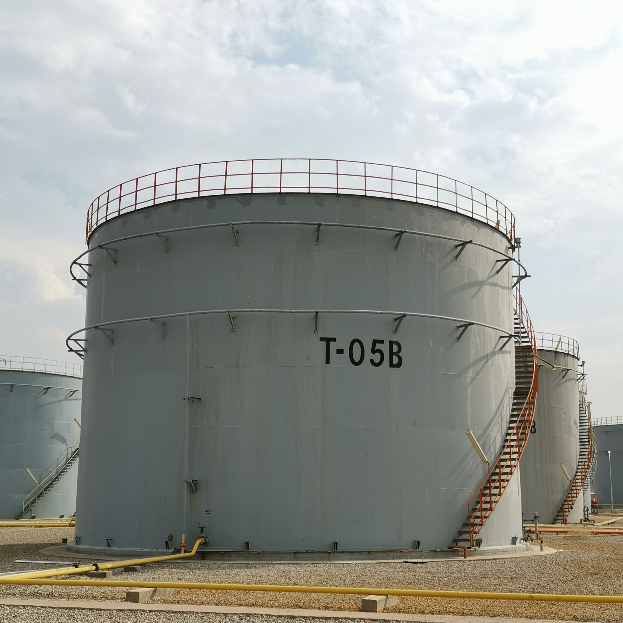 کوردی: storage tank